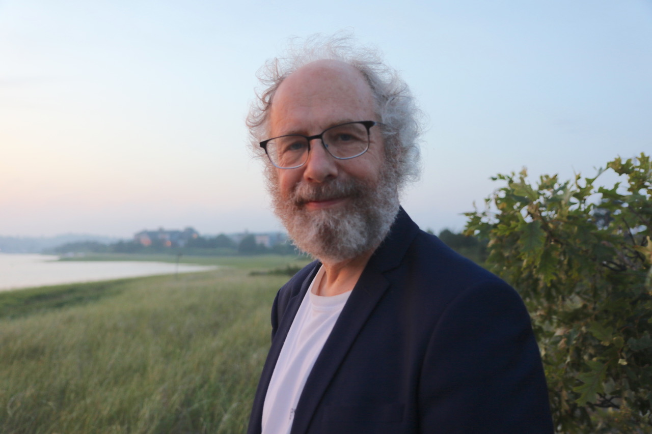 Portrait du physicien François David